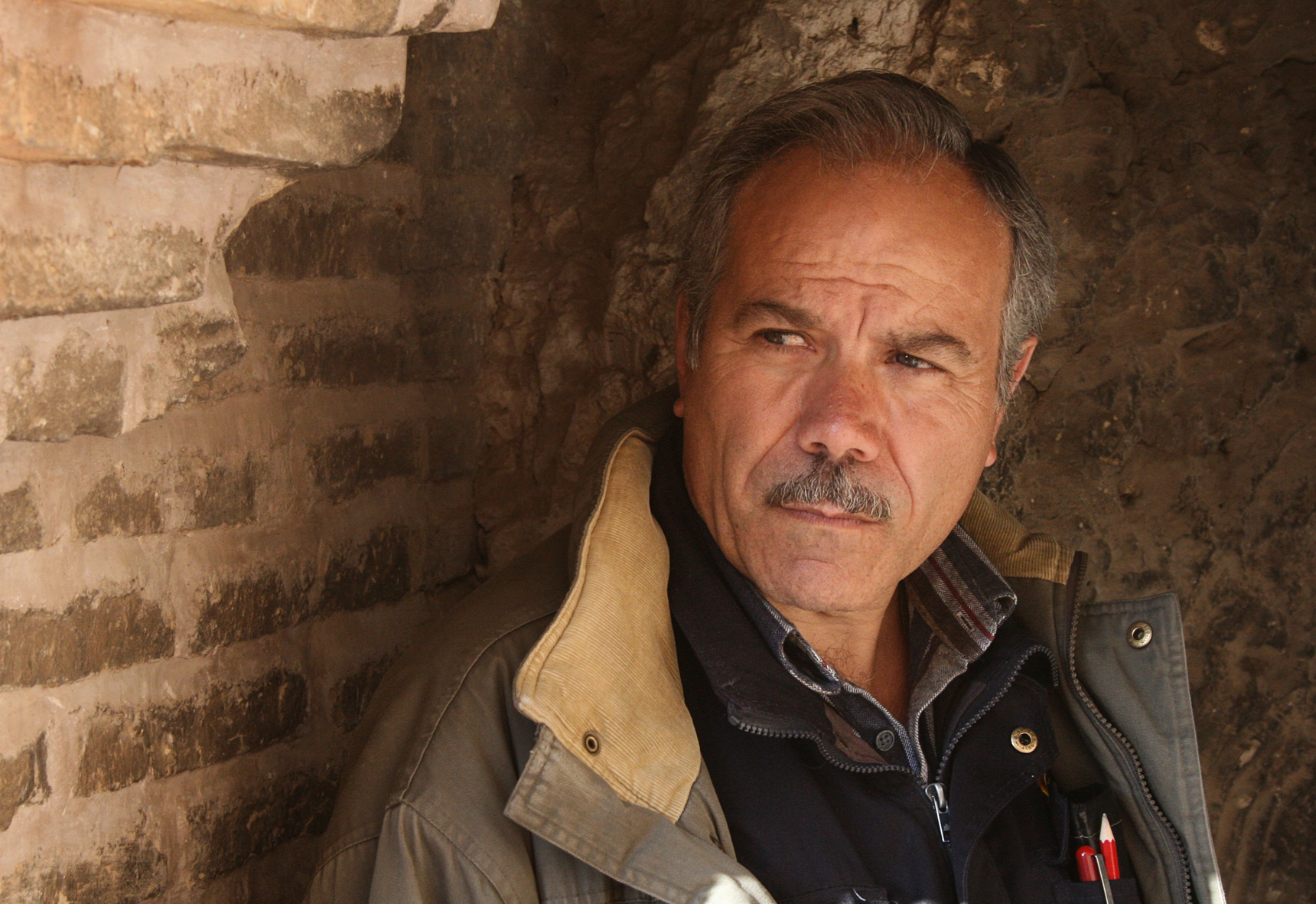 Francisco Rodríguez, director de cine